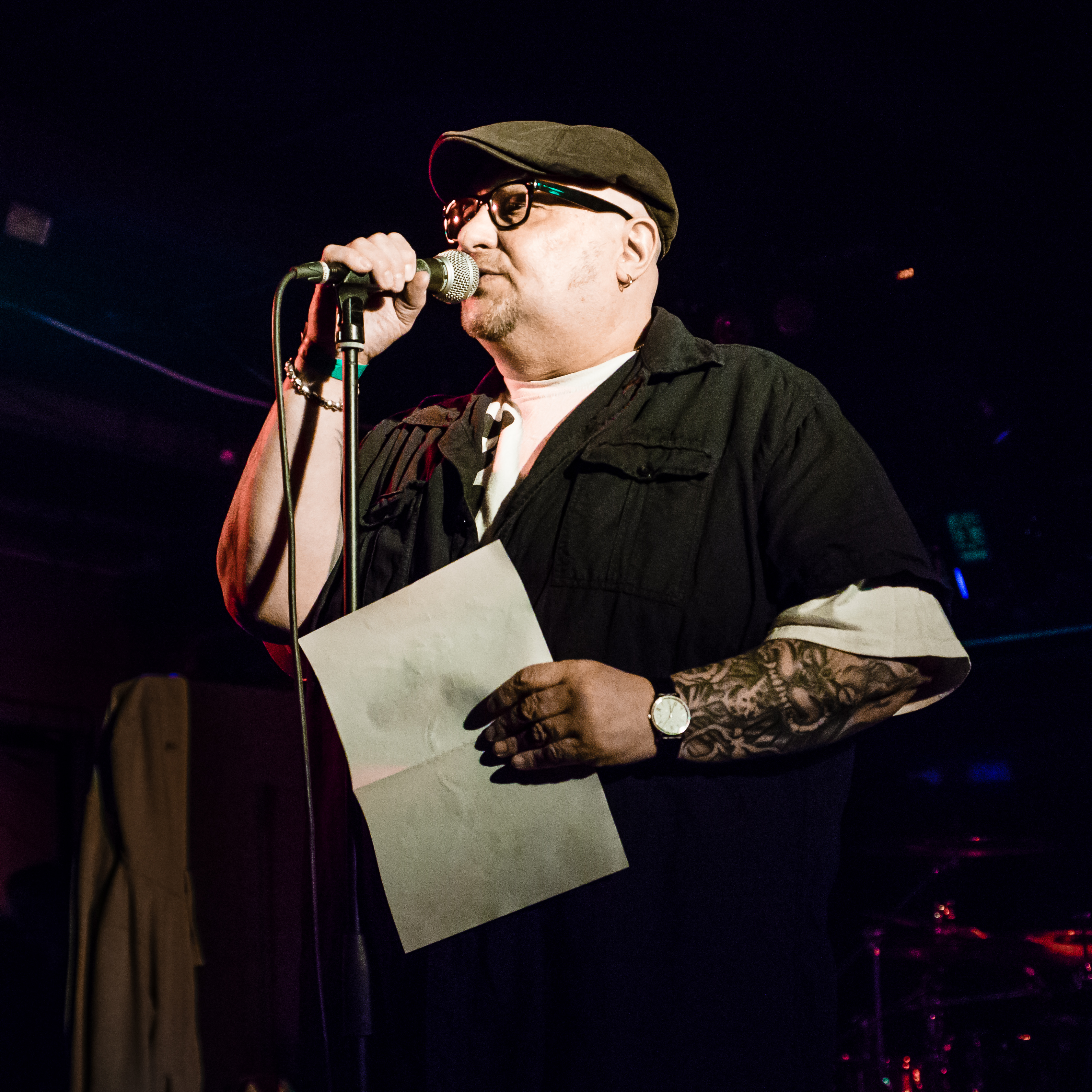 Przemysław „Jah Jah” Frankowski, polski dziennikarz muzyczny, podczas koncertu Rock Na Zielono w klubie Proxima, Warszawa 21 kwietnia 2013.